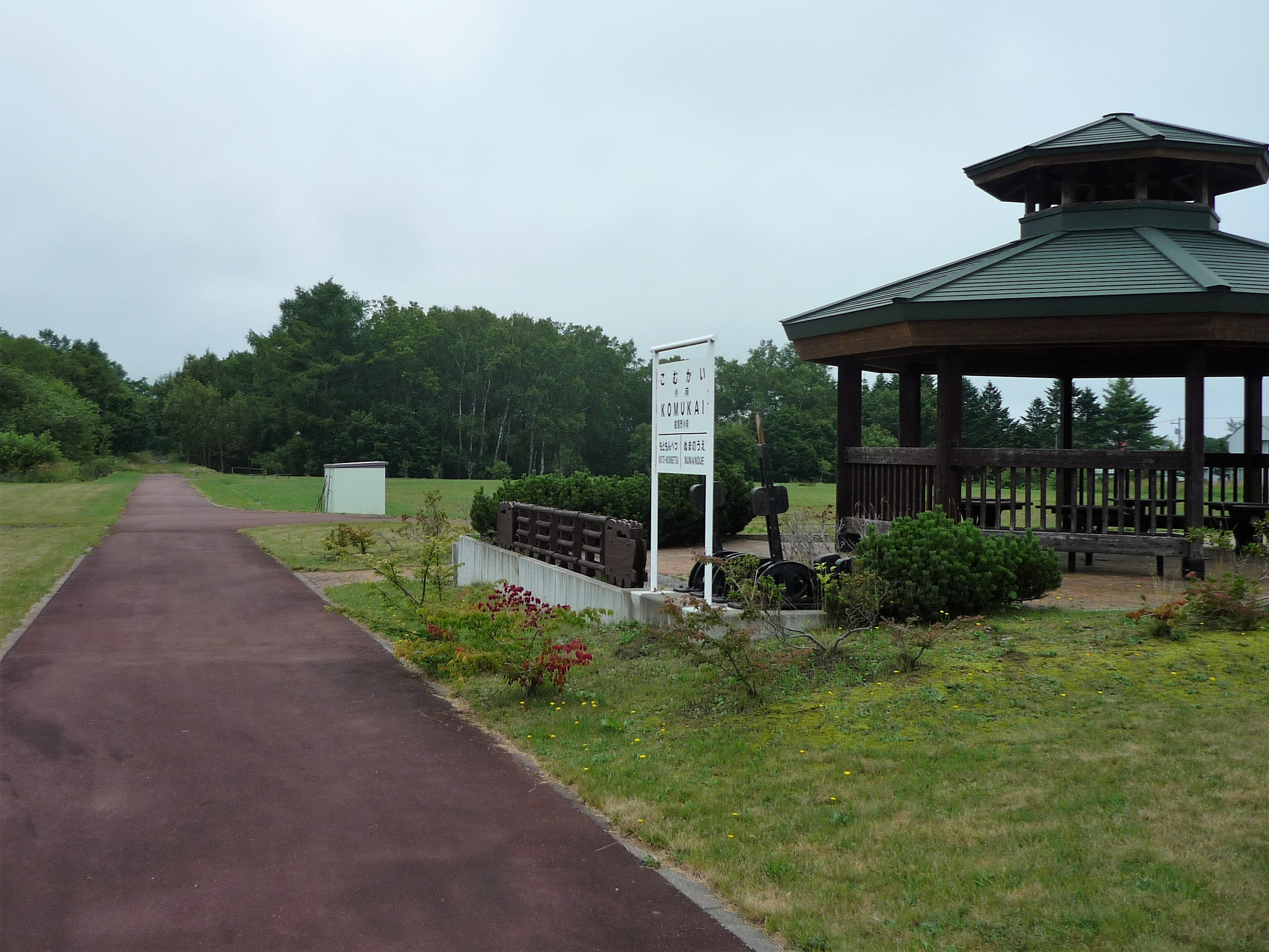 名寄本線小向駅跡（2018年8月撮影） Panasonic Lumix DMC-FS3